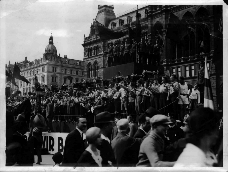 Blick auf das Rathaus (linker Flügel), auf der Tribüne: Adelheid Popp, Johann Schorsch, Albert Sever; dahinter Rote Falken, Musikanten mit Blasinstrumenten, dahinter auf erhöhter Tribüne Vertreter des republikanischen Schutzbundes. Links an der Rampe der Tribüne: Karl Honay.